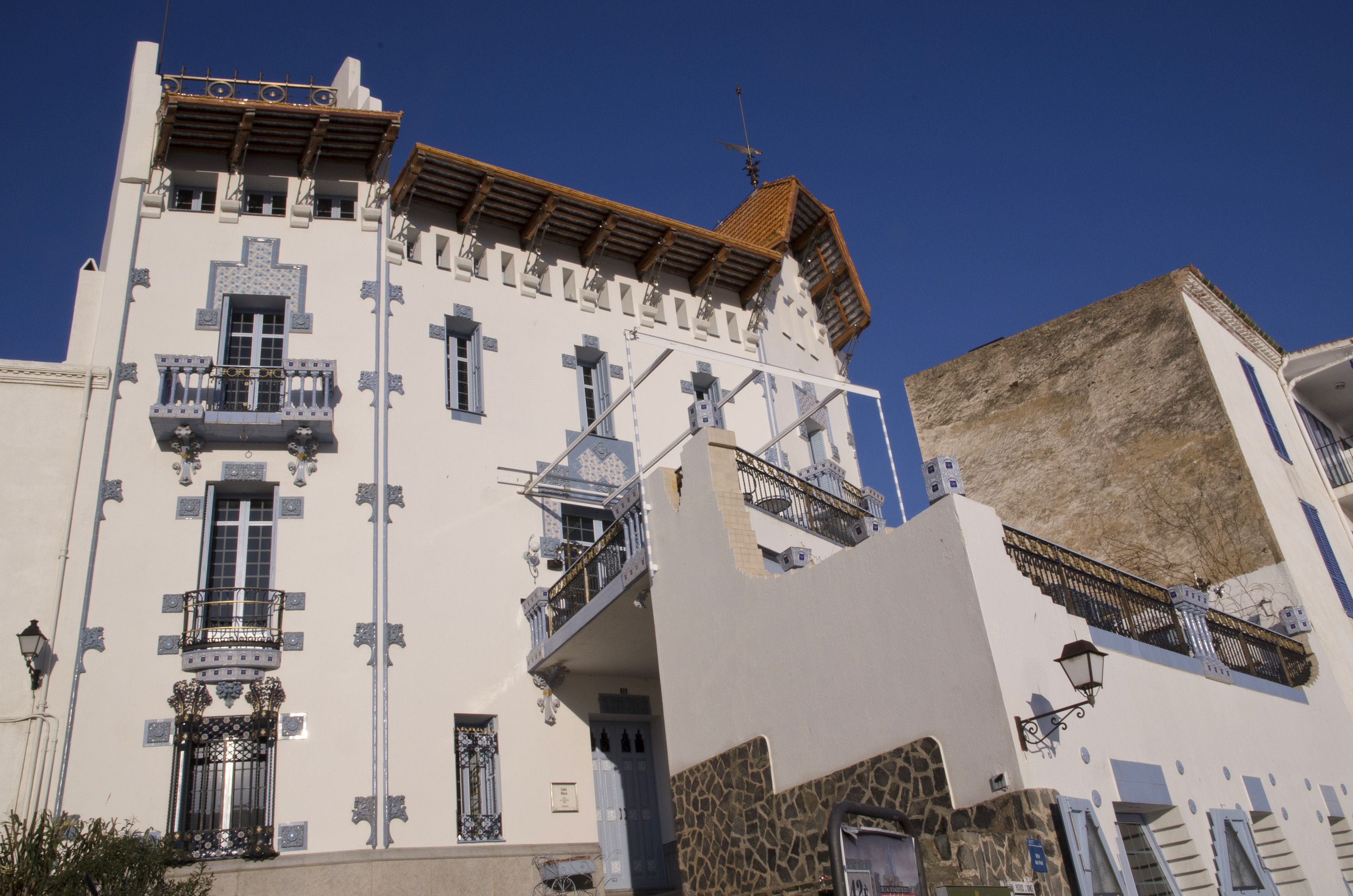 La Casa Serinyana « Casa Blaua », 1910 (la maison bleue en catalan) date de l’époque où des habitants de Cadaqués étaient partis faire forture en Amérique (à Cuba) et qui sont ensuite retournés à Cadaqués se faire construire de belles demeures.